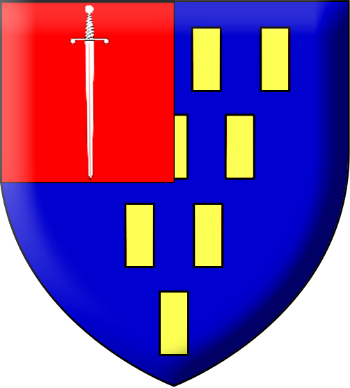 Autres armes de la famille de Lantivy (à partir d'un dessin de Gretaz) : D’azur, à 10 billettes d’or, 3, 3, 2 et 1 qui est de Baud, au franc-canton de gueules chargé d’une épée d’argent (blasonnement figurant dans l'Histoire généalogique de la maison de Lantivy, par Théodore Courtaux et le Cte de Lantivy de Trédion).